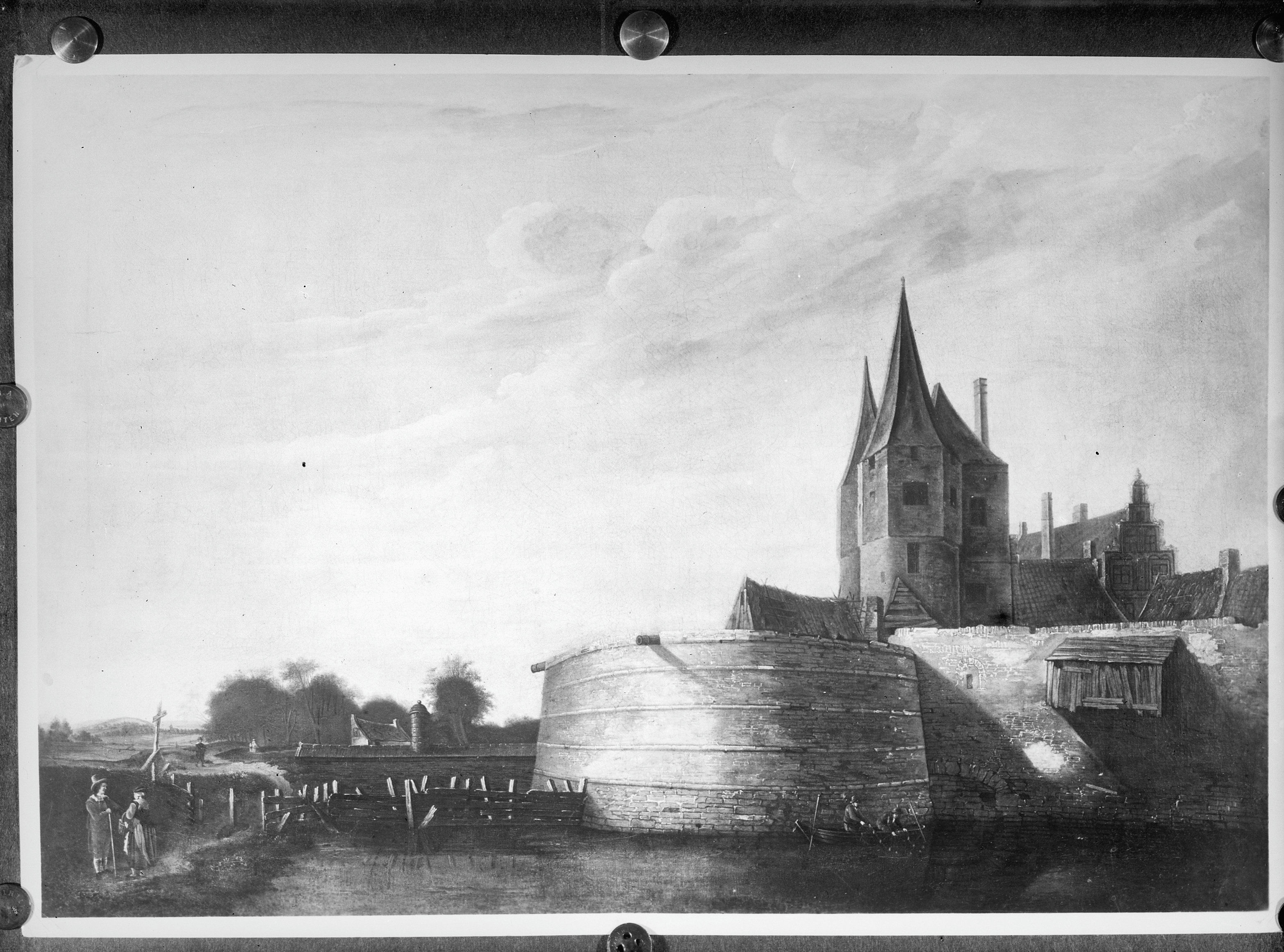 Noorderpoort: naar schilderij in Italiaans bezit